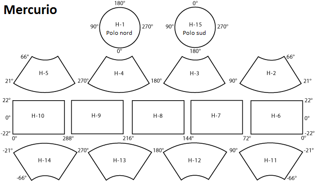 Schema delle maglie di Mercurio. Derivato da "Mercury quads.png" traducendo le etichette in italiano.